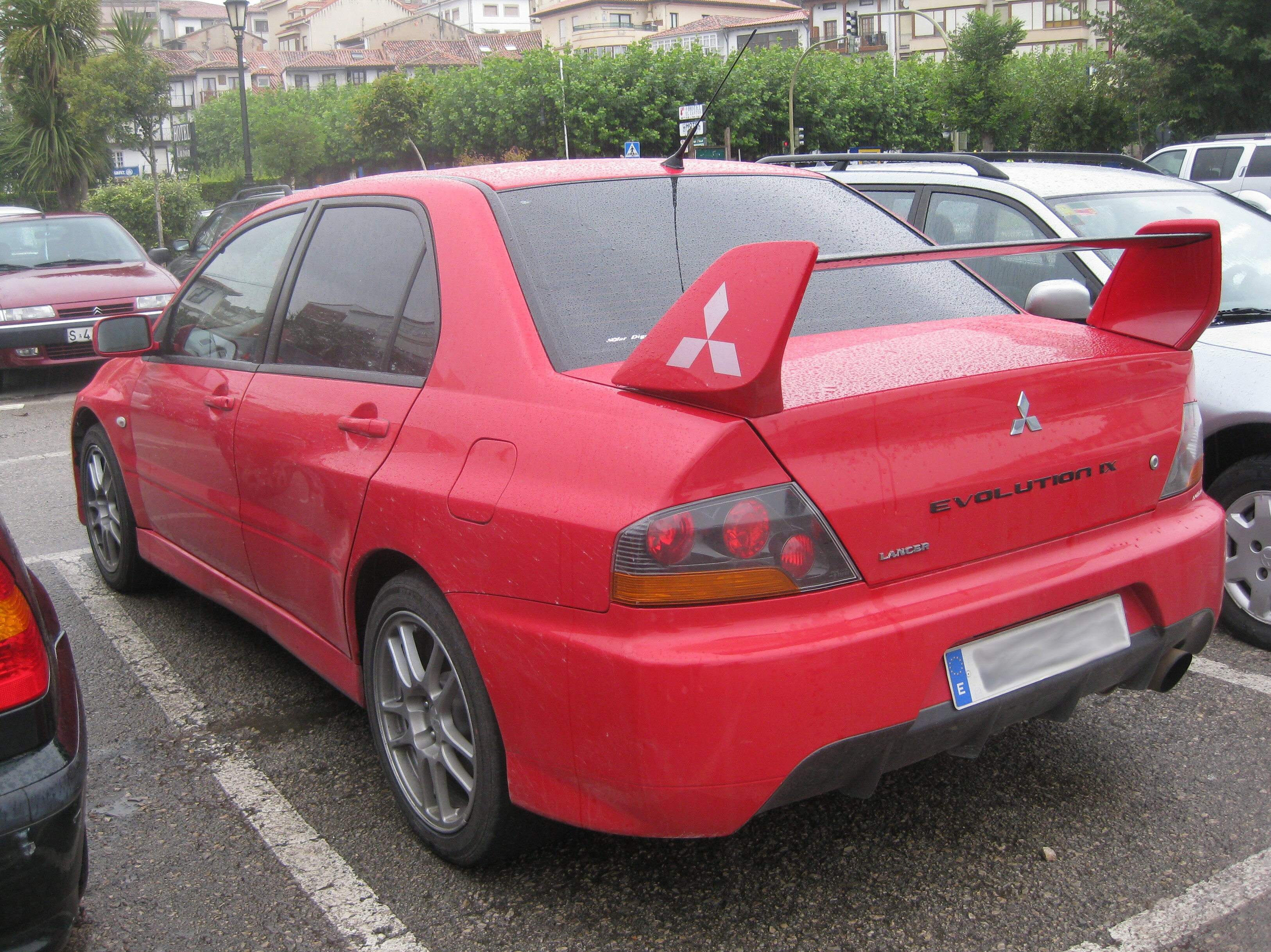 Seen in San Vicente de la Barquera (Cantabria).